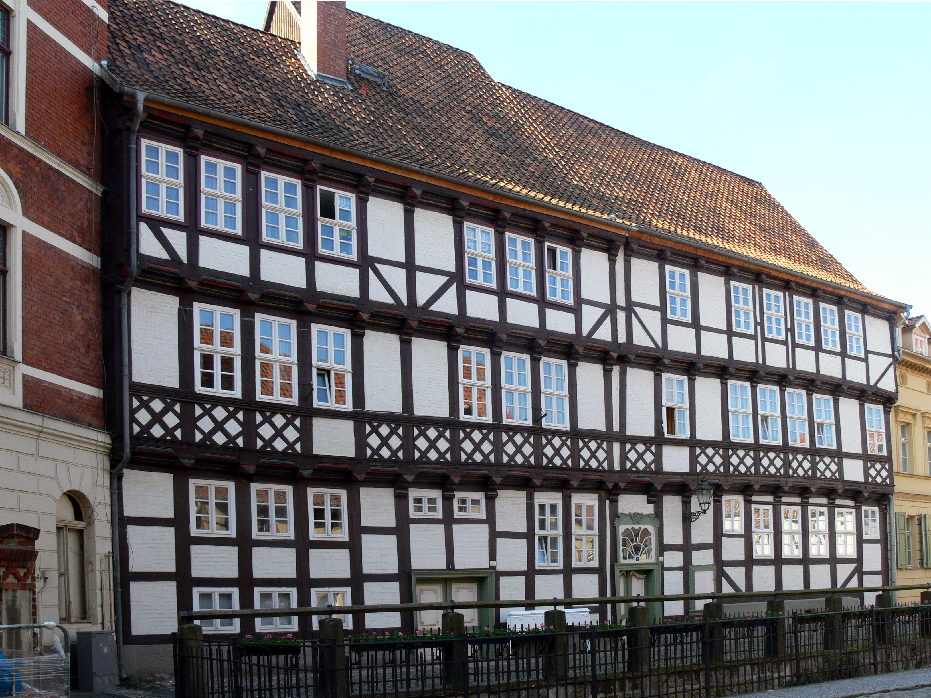 Die Häuser Word 1, 2 und 3 in Quedlinburg.